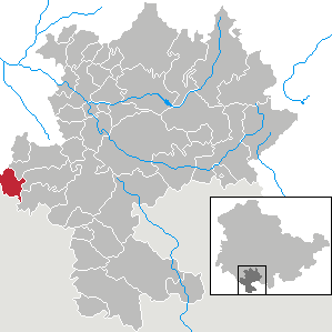 Mendhausen in Thuringia - district Hildburghausen